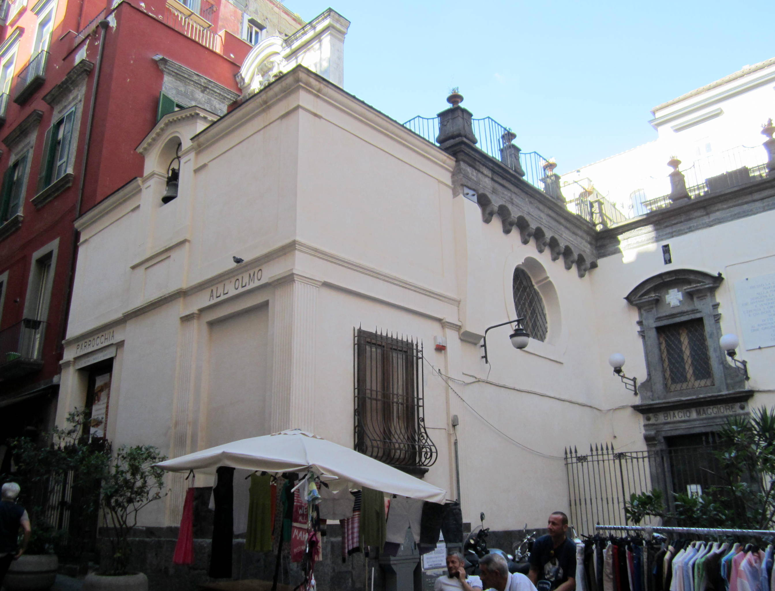 Chiesa di San Gennaro all'Olmo a Napoli